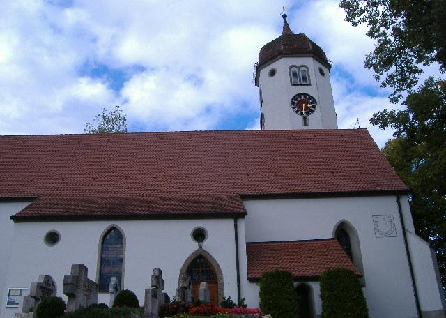 Hohenaltheim